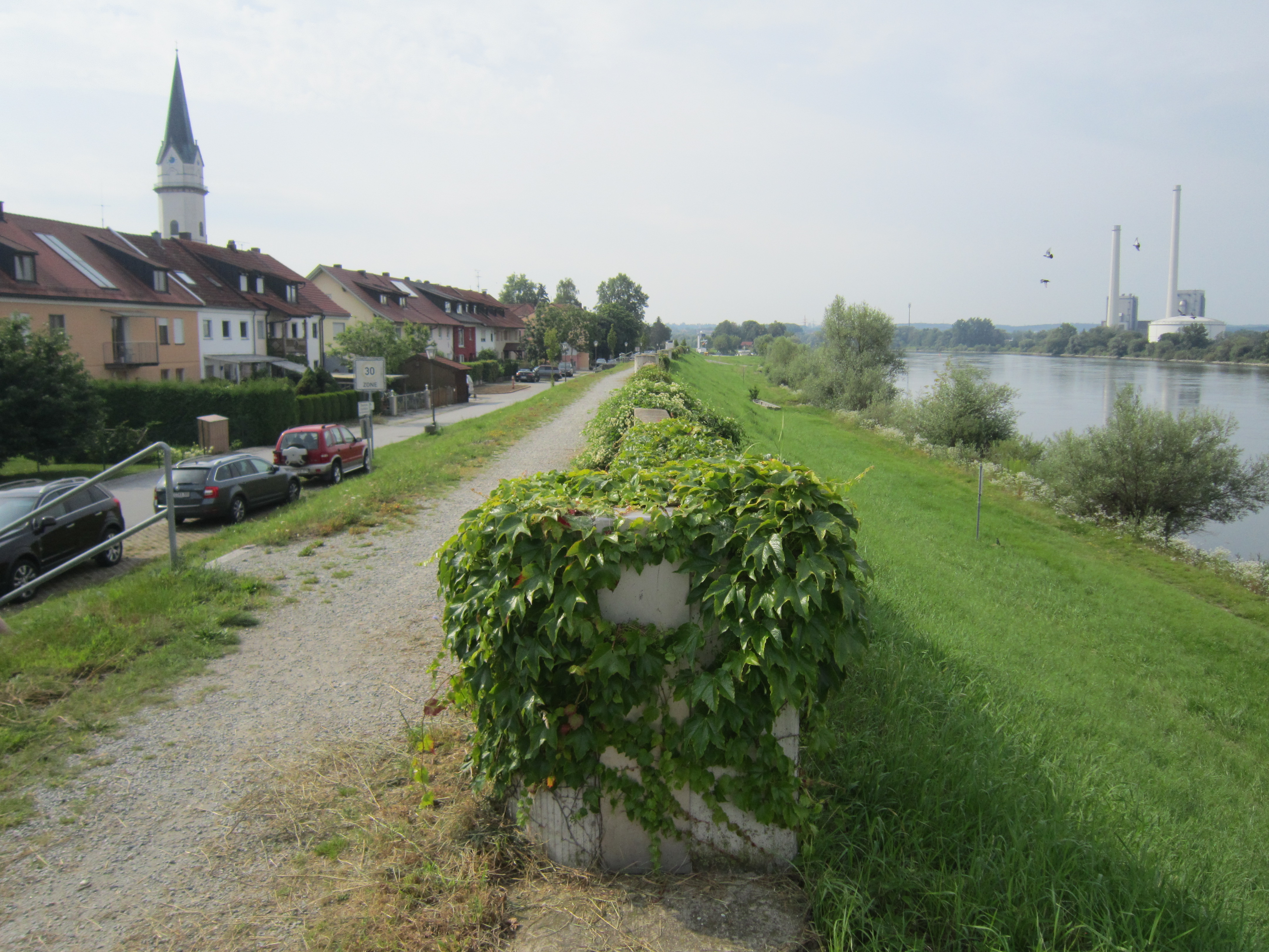 Vom Donaudeich bei Hofkirchen im Landkreis Passau aus blickt man (von links nach rechts) in den Ort Hofkirchen, entlang dem Donaudeich und der Donau hinüber zum Wärmekraftwerk Pleinting, das auf dem Gebiet der Stadt Vislhofen an der Donau liegt.